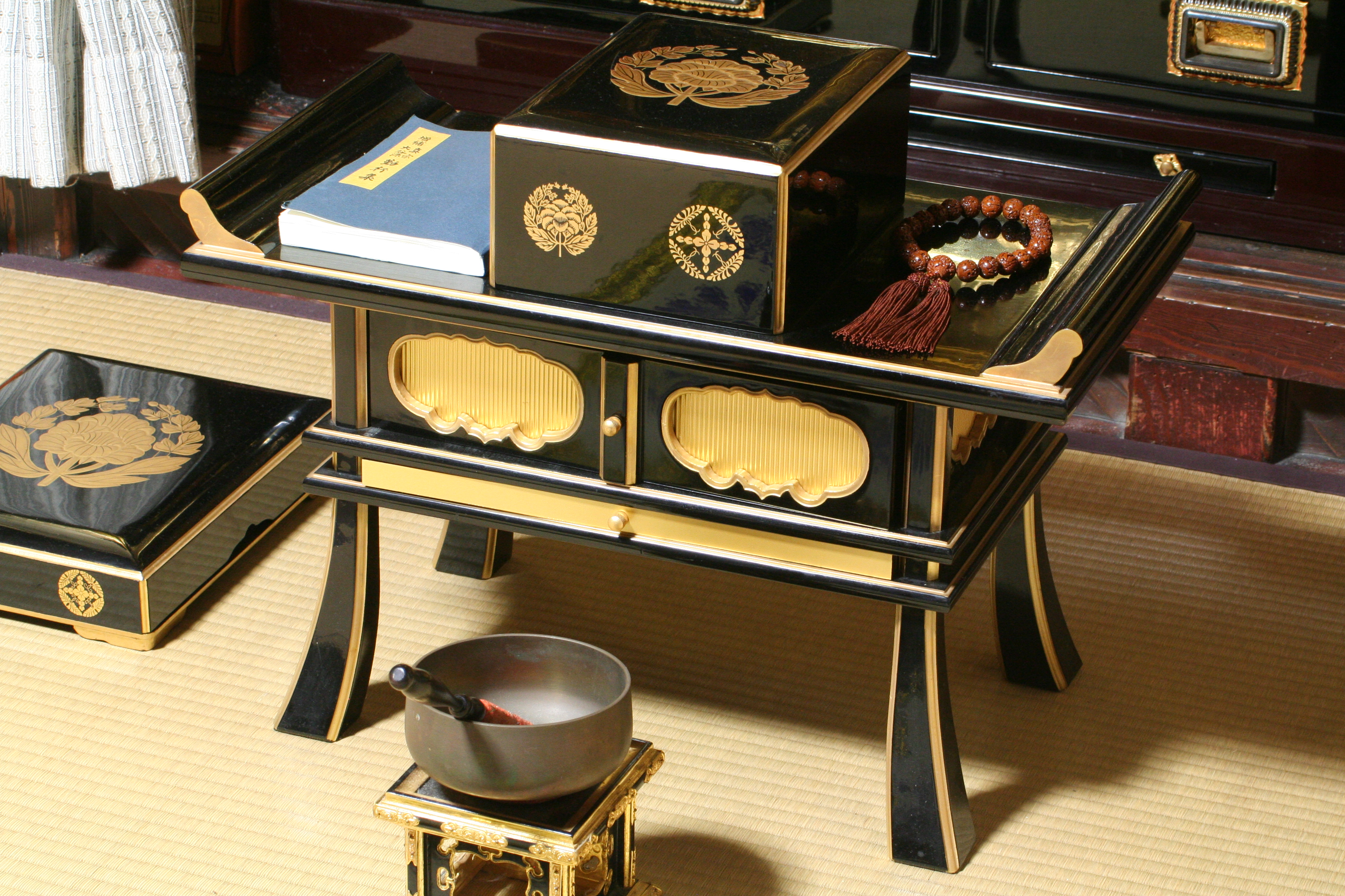 一般家庭にある経机。